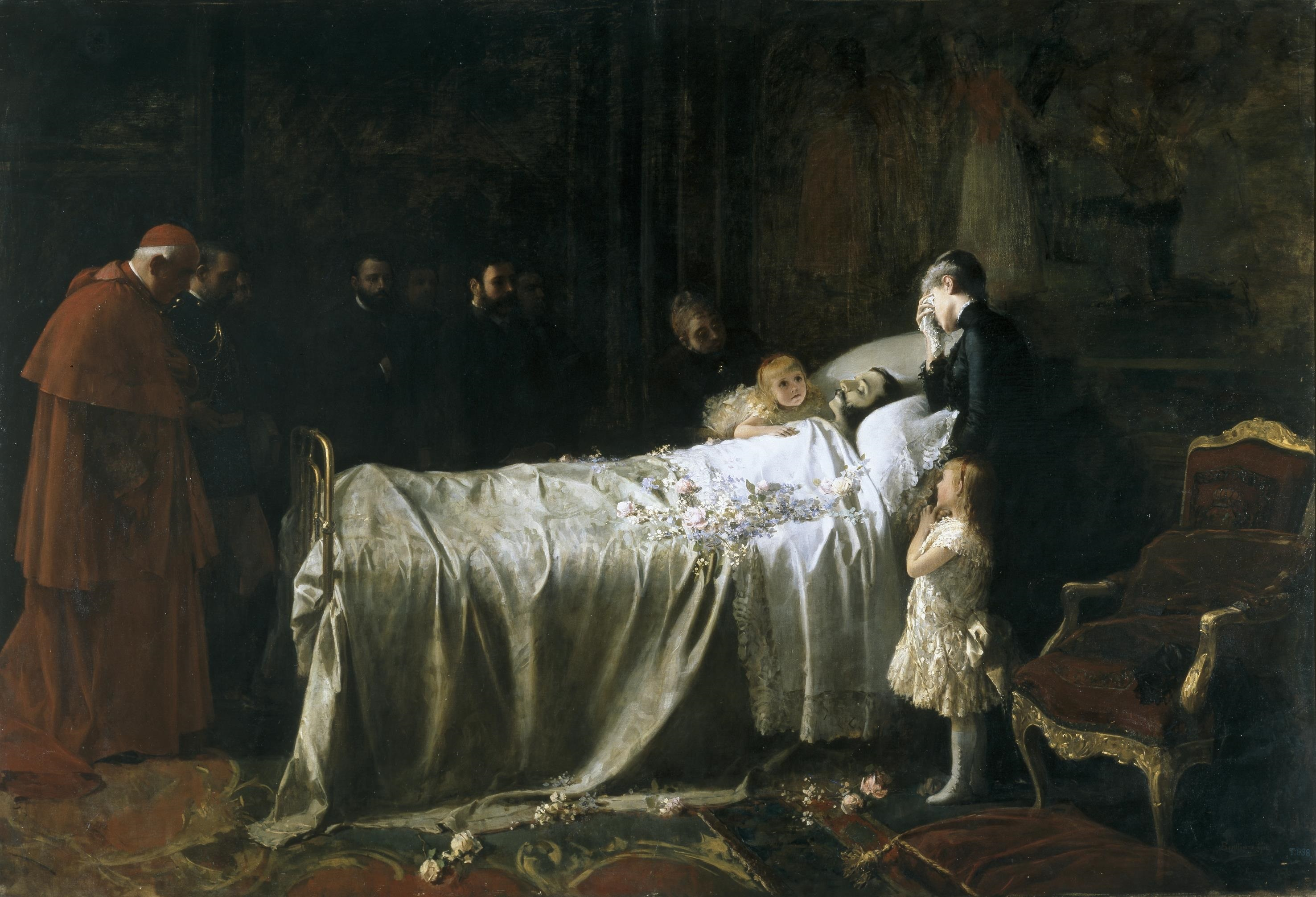 El lienzo representa la muerte del rey Alfonso XII de España (1857-1885), ocurrida el día 25 de noviembre de 1885 en el Palacio del Pardo. Junto a la cama del rey aparecen la reina María Cristina de Habsburgo-Lorena, viuda de Alfonso XII, las infantas María de las Mercedes de Borbón y Habsburgo-Lorena y María Teresa de Borbón, hijas del difunto monarca, el cardenal Francisco de Paula Benavides Navarrete y Antonio de Orleans, duque de Montpensier y suegro del difunto soberano.